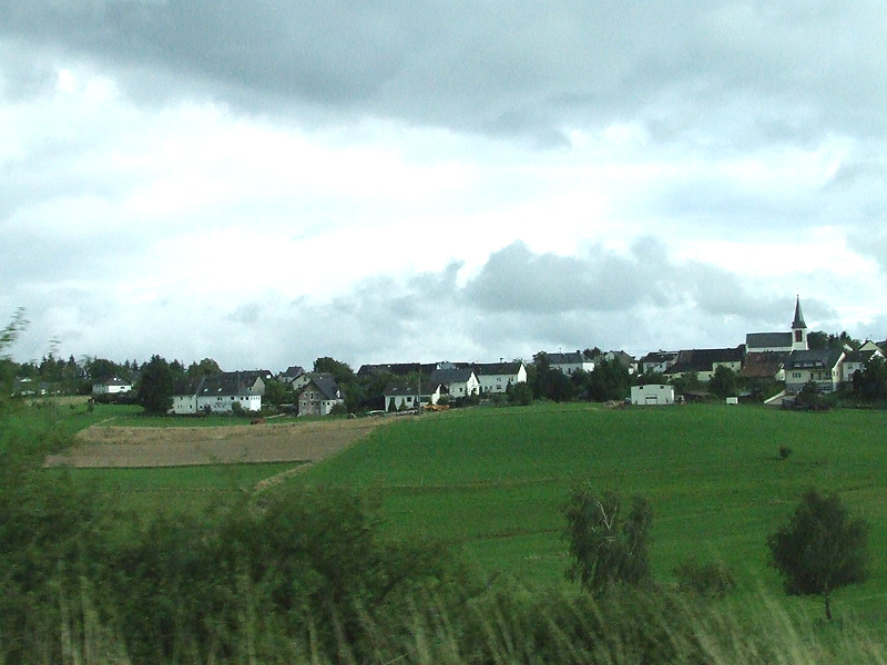 Kliding im Landkreis Cochem-Zell, Eifel